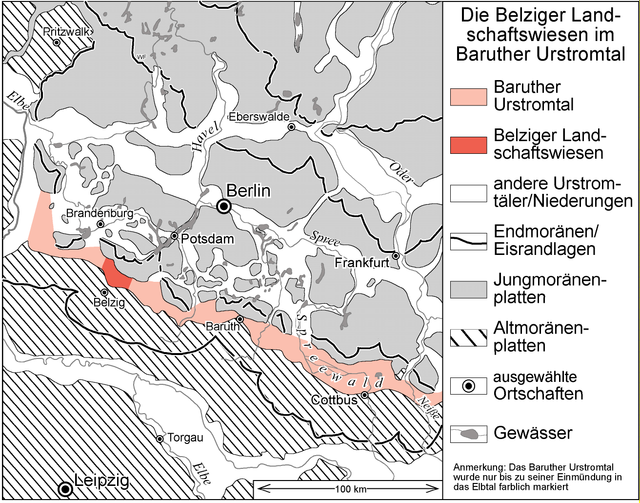 Die Lage der Belziger Landschaftswiesen innerhalb des Baruther Urstromtales; Zeichnung von Grabenstedt 11:33, 20. Mär 2006 (CET)